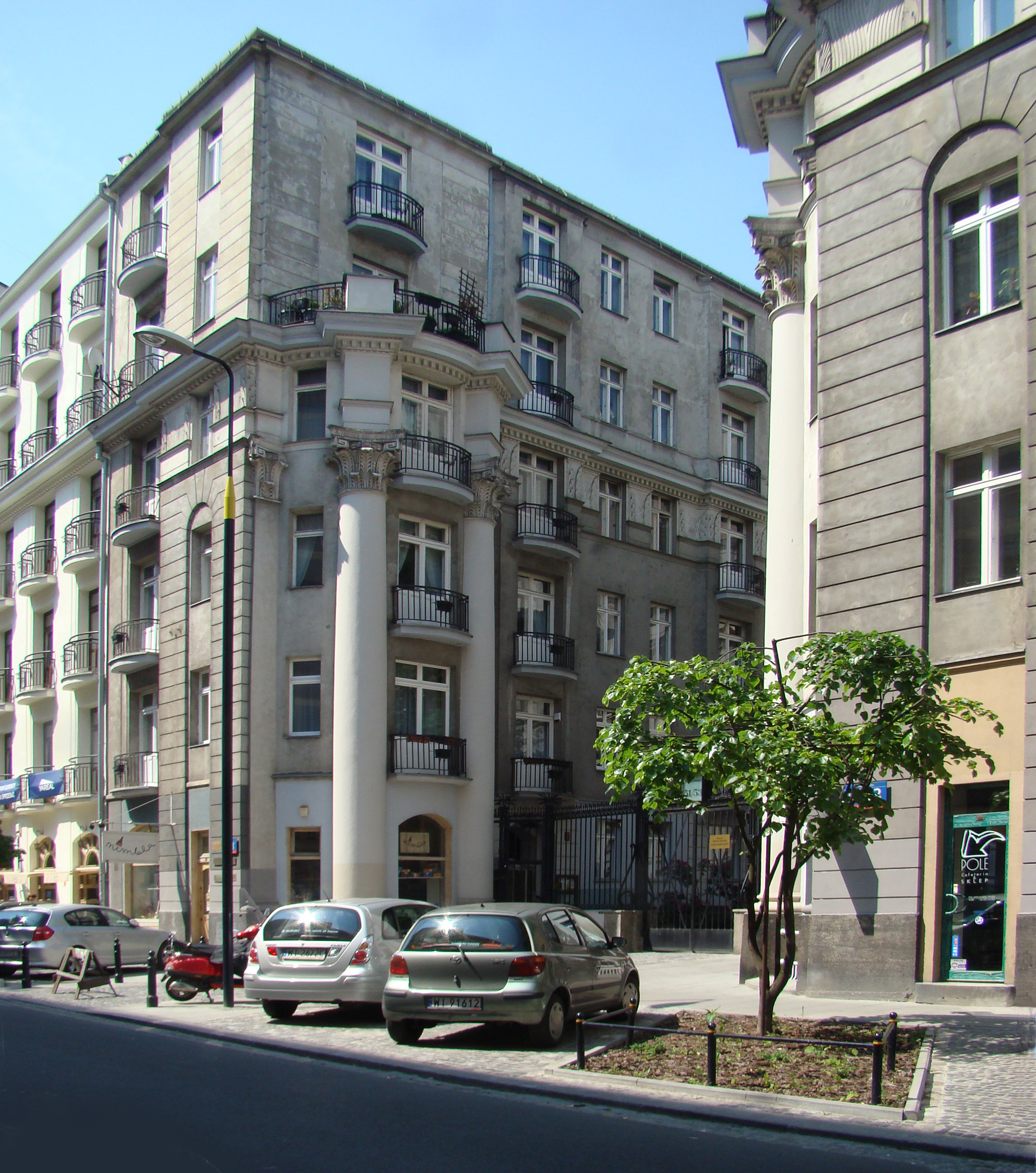 Kamienica Mokotowska 51/53, arch. Marian Lalewicz